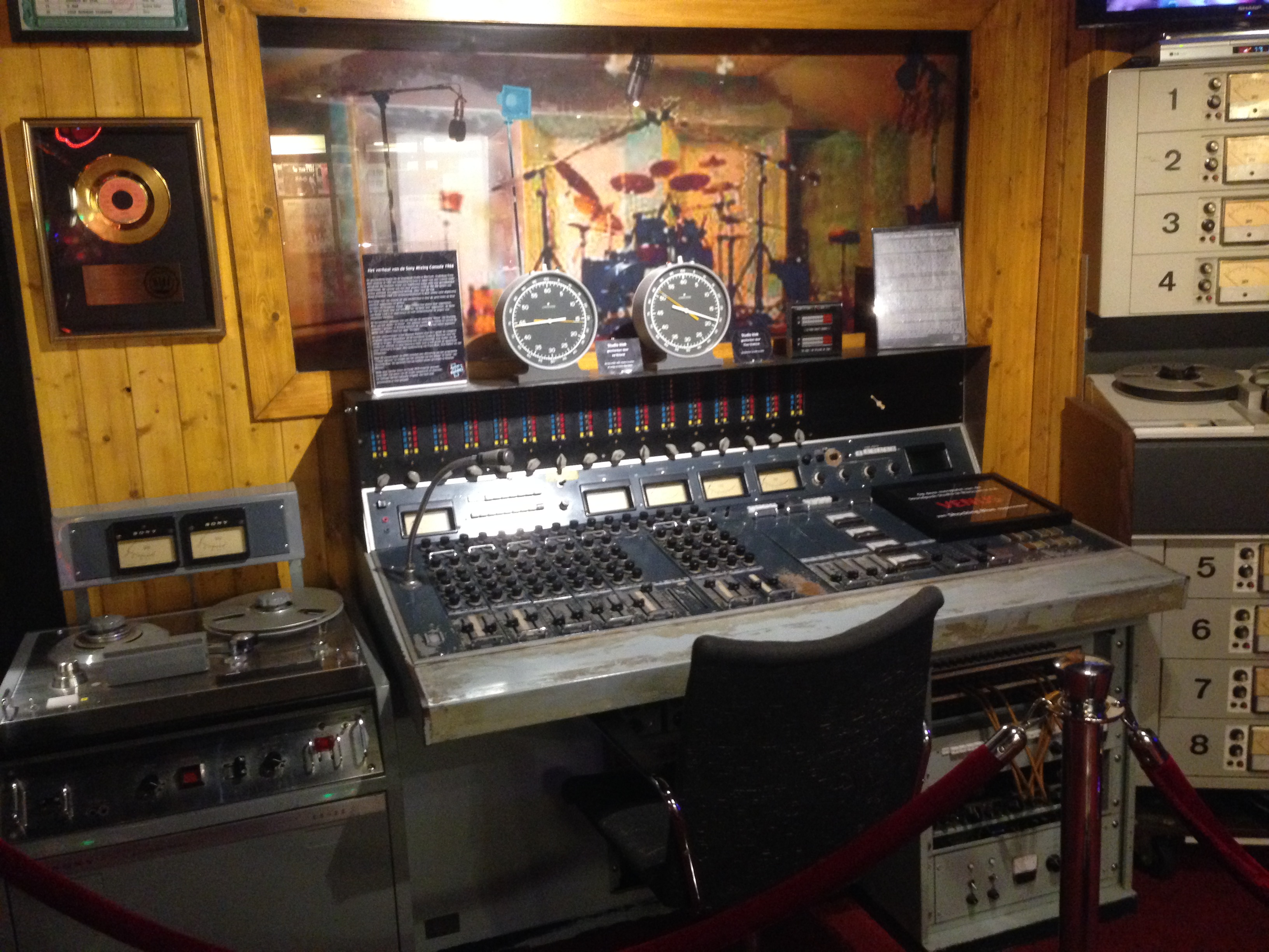 Museum RockArt, Hoek van Holland, Netherlands